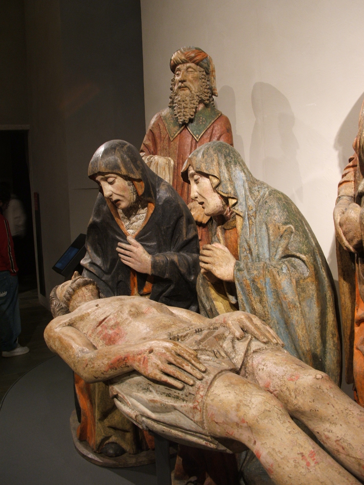 Museo Civico d'Arte Antica di Torino - gruppo ligneo "Compianto sul Cristo morto" - Domenico Merzagora (Maestro di Santa Maria Maggiore in Val Vigezzio), XV secolo